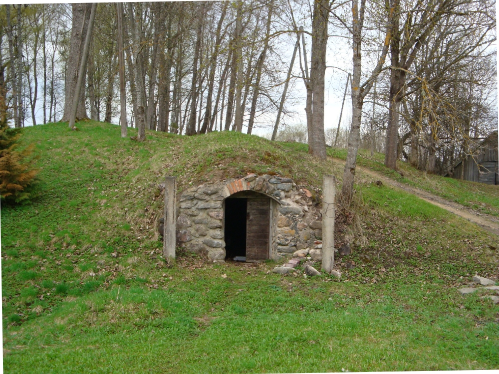 Linnusekünkas olev kelder.